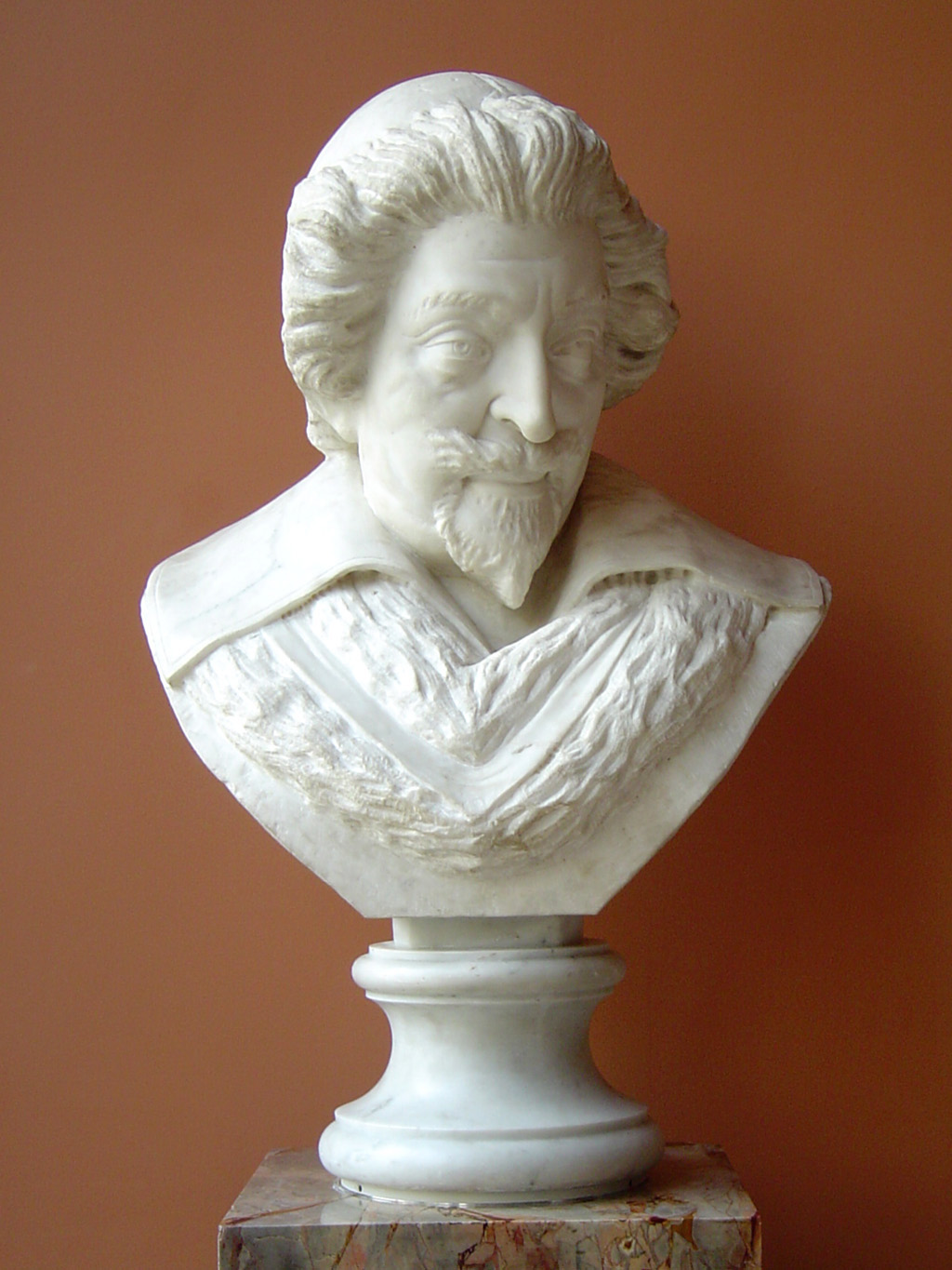 Nicolas Le Jay